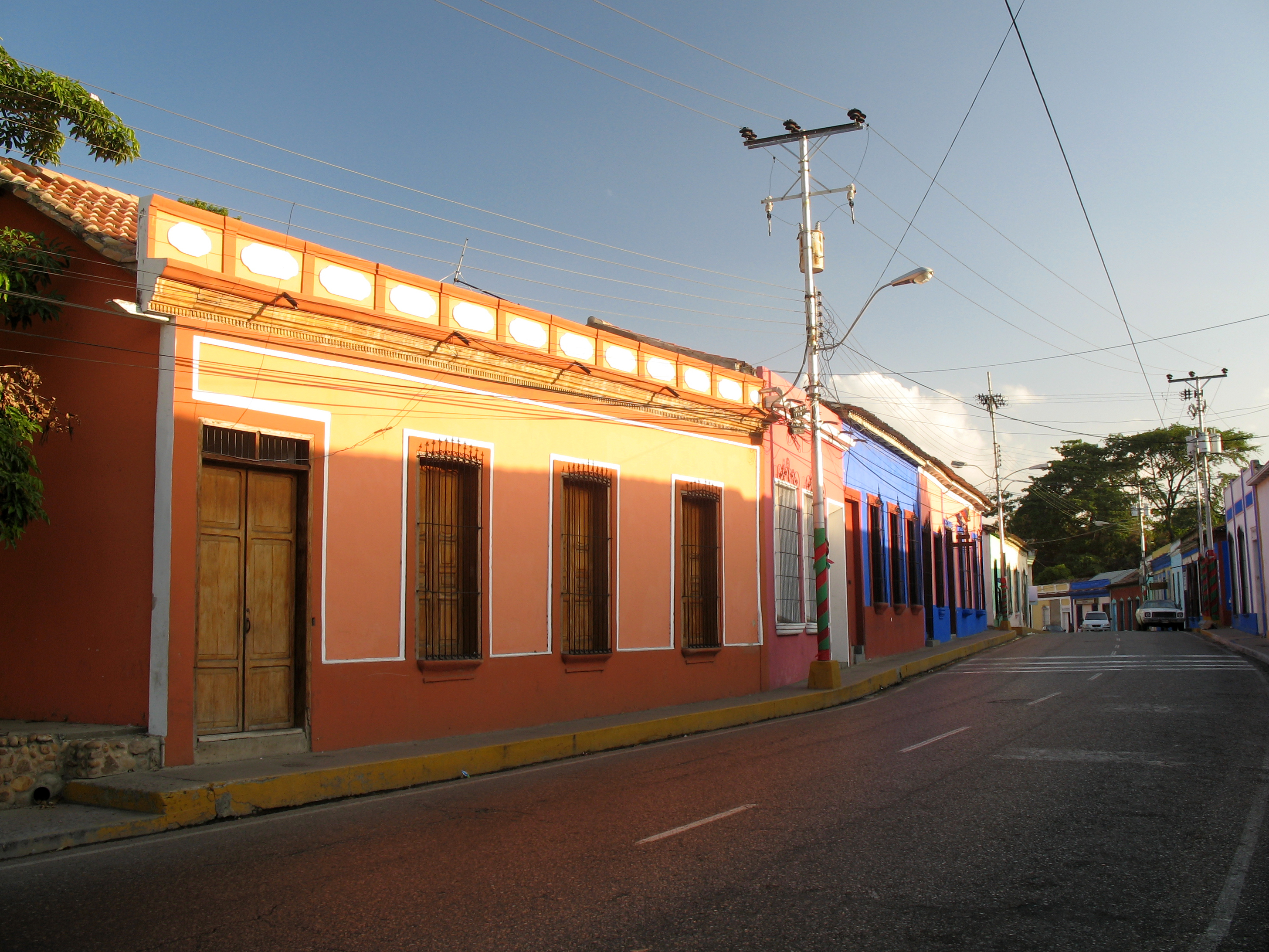 Calle Sucre, San Francisco